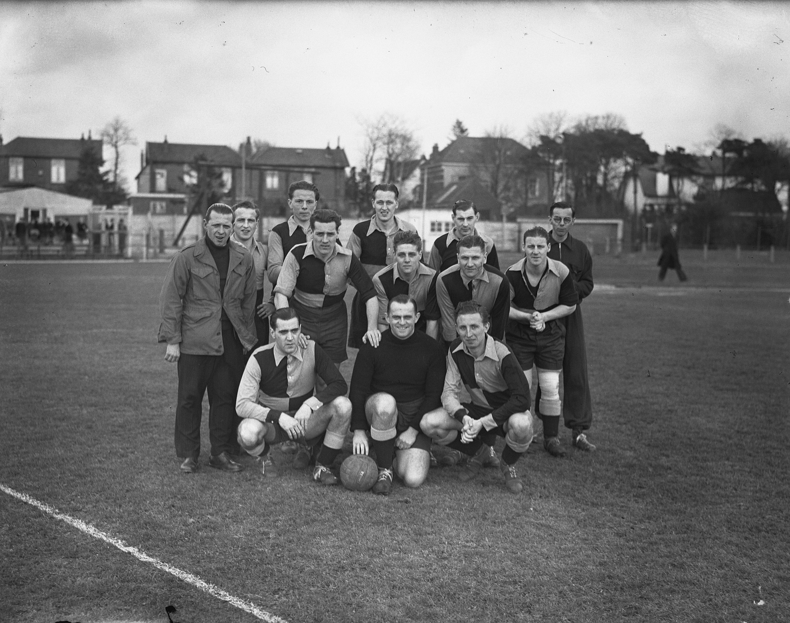 Collectie / Archief : Fotocollectie Anefo Reportage / Serie : [ onbekend ] Beschrijving : 't Gooi tegen EDO, EDO elftal Datum : 20 maart 1950 Locatie : Hilversum Trefwoorden : groepsportretten, sport, voetbal Fotograaf : Nijs, Jac. de / Anefo, [onbekend] Auteursrechthebbende : Nationaal Archief Materiaalsoort : Glasnegatief Nummer archiefinventaris : bekijk toegang 2.24.01.09 Bestanddeelnummer : 903-8737